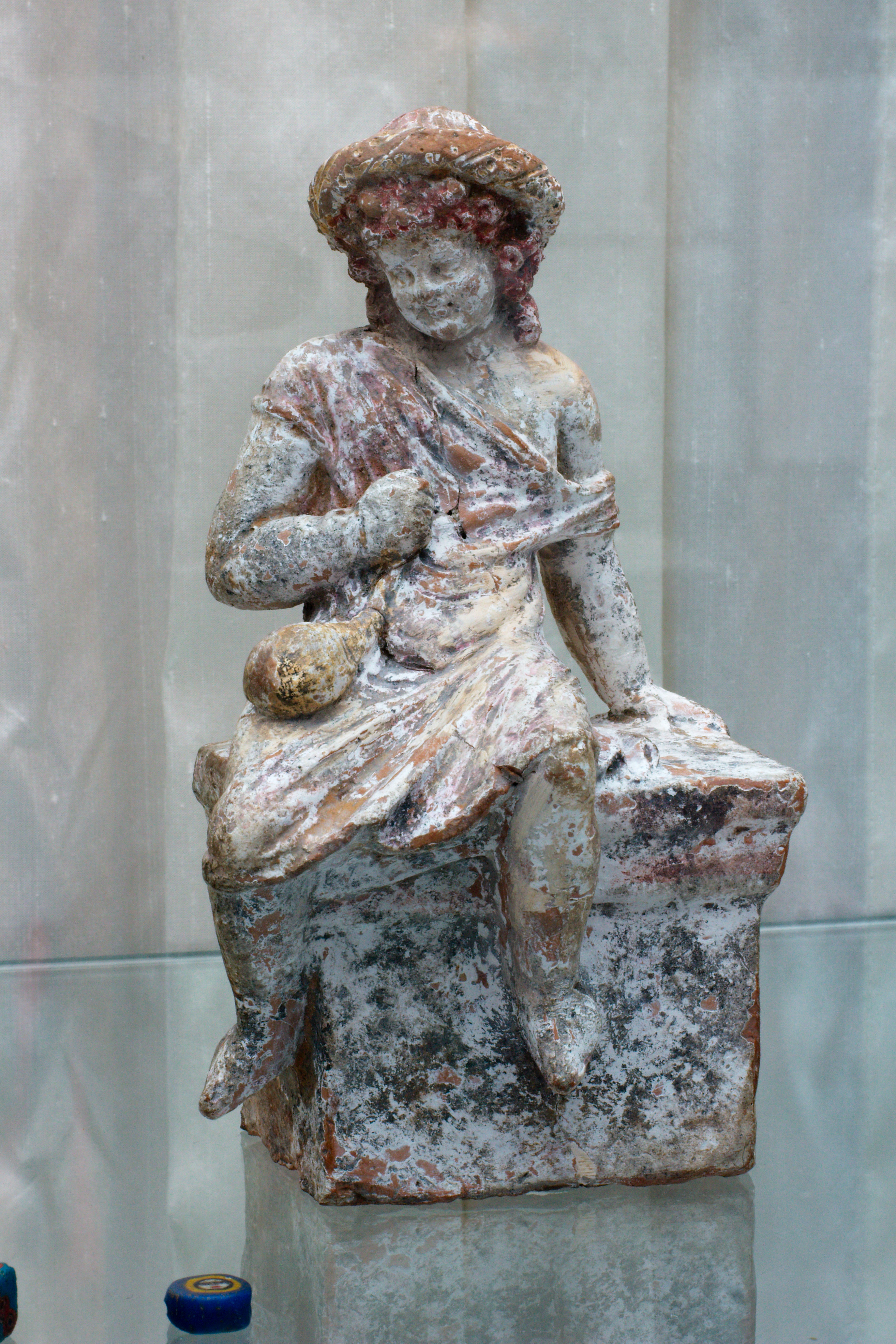 Griechische Terrakottastatue eines sitzenden Knaben